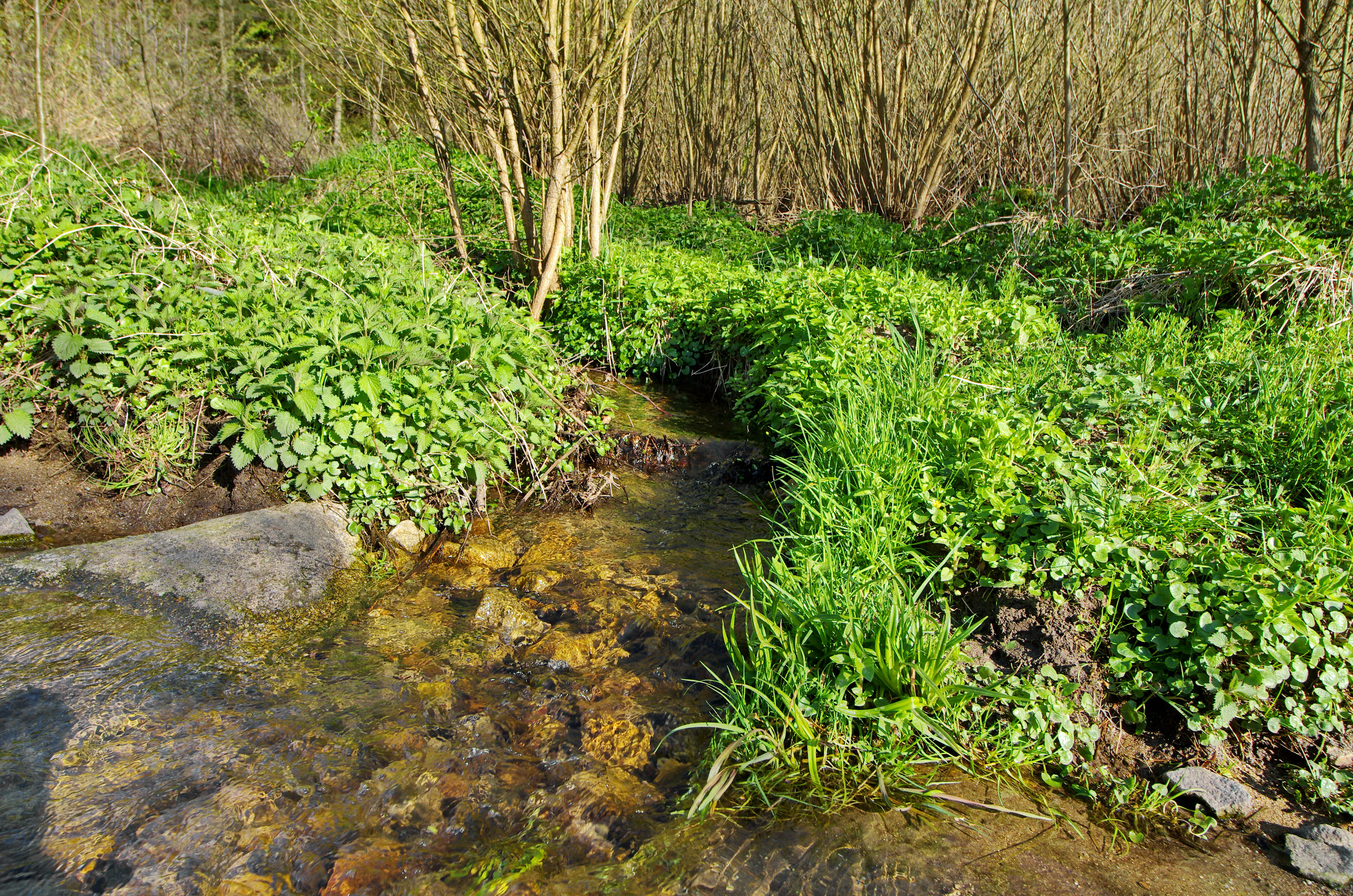 Hruškovský potok, okres Sokolov